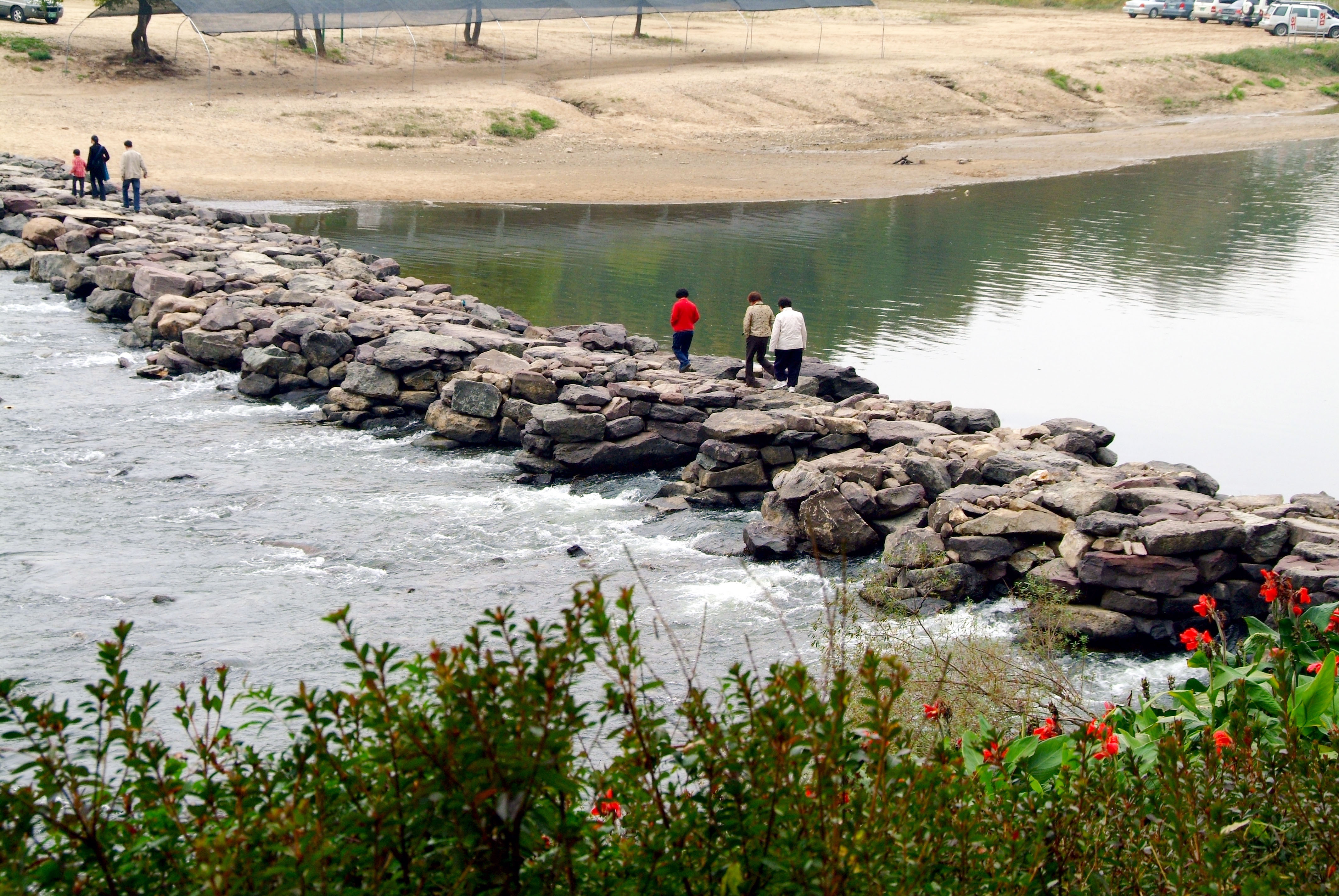 진천 농다리 전경